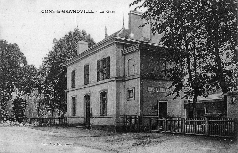 Le bâtiment voyageurs vers 1920.